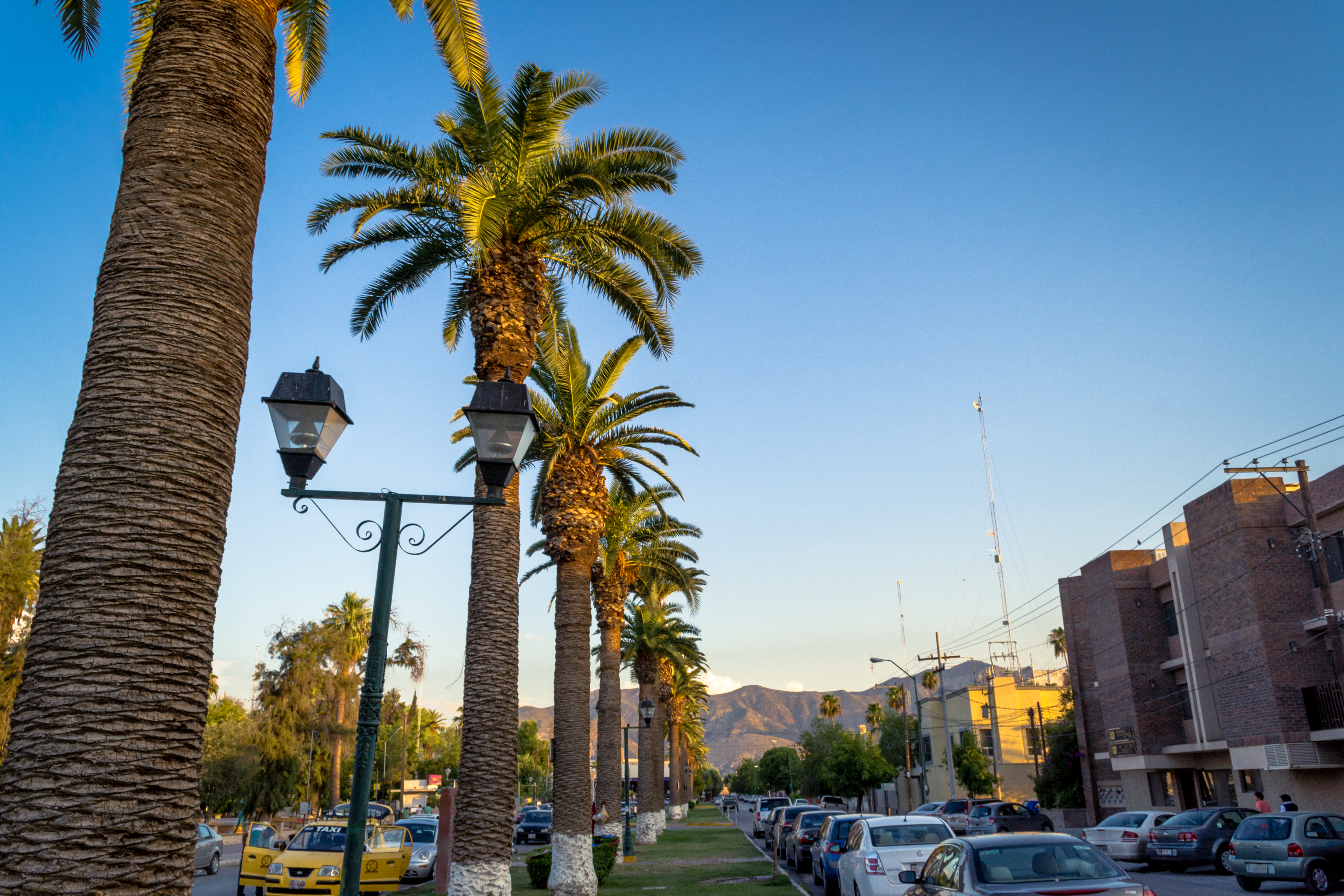 Palmeras datileras alrededor de la Alameda de Zaragoza en Torreón. Coahuila, México.